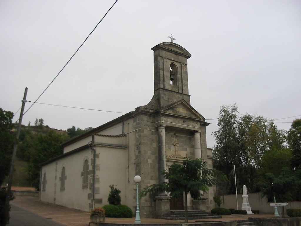 Die Kirche von Nicole